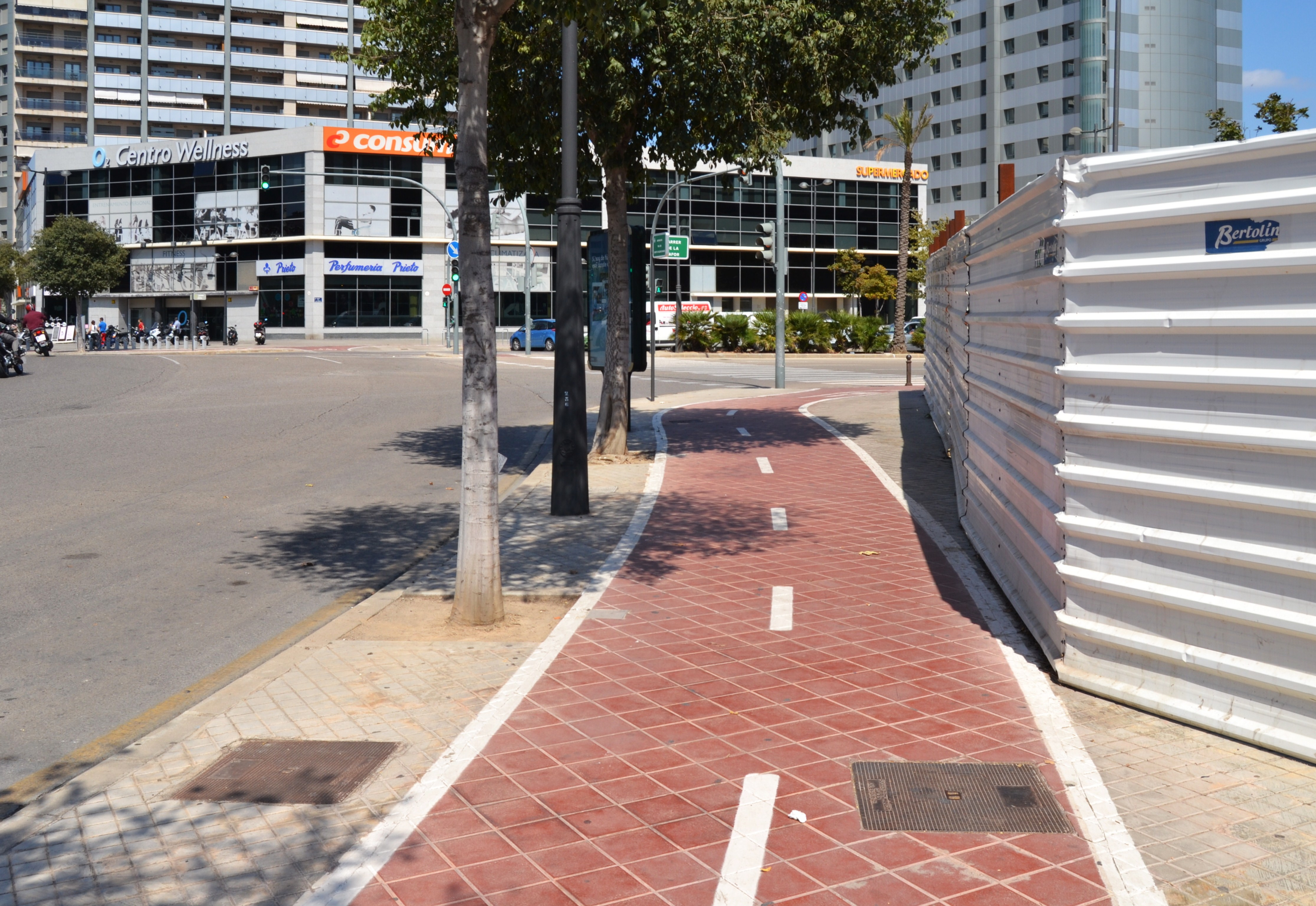 Avinguda de les Corts Valencianes de València, carril bici.